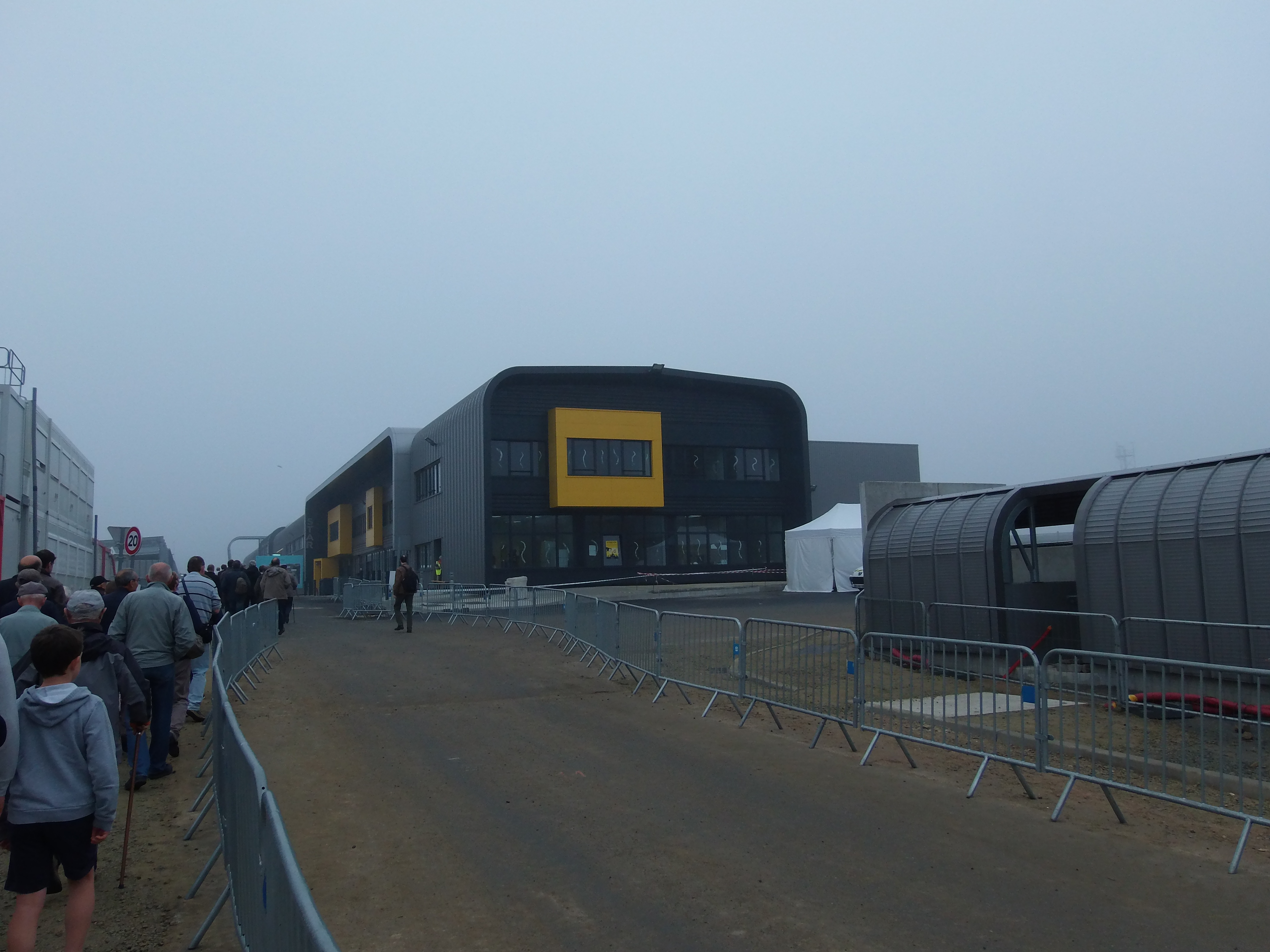 Bâtiment principal. Photo prise lors des portes ouvertes de l'atelier du métro ligne B de Rennes, à Saint-Jacques-de-la-Lande.